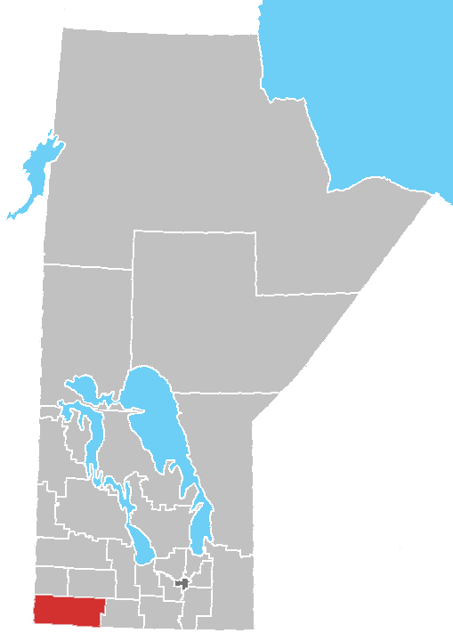 Manitoba census area No. 5